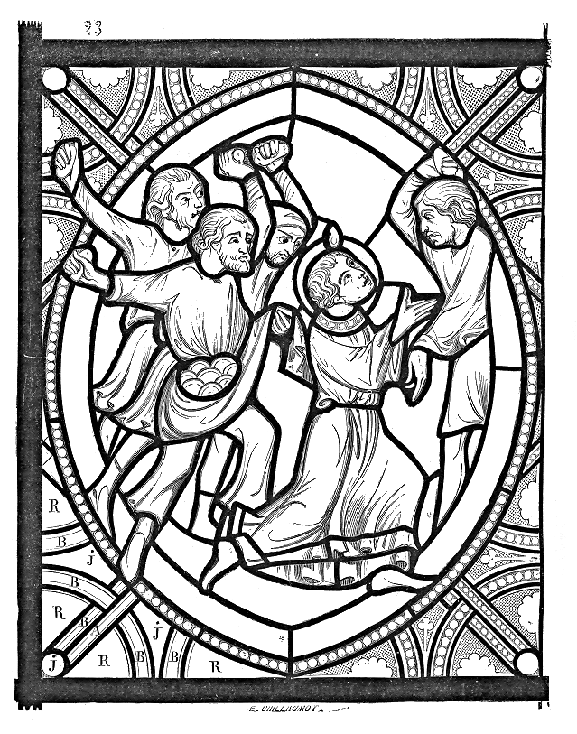 ... Voici (fig. 23) un panneau tiré d'une des verrières de cette cathédrale de Bourges, et qui représente le martyre de saint Étienne. Il est difficile, dans un petit espace, de mieux exprimer, par la composition, la scène de la lapidation du saint. Les gestes sont exprimés avec une vérité absolue. Les personnages, cependant, conformément à notre précédente observation, se détachent autant que possible sur le fond, tout en formant groupe. Le dessinateur ne s'est pas astreint d'ailleurs à rester dans les limites du cadre, il les franchit; ce qui contribue encore à donner plus de vivacité à la scène. Plus rien d'archaïque dans les plis; leur dessin est fidèlement interprété d'après la nature. Les vêtements sont ceux du temps, et abandonnent les traditions byzantines encore si marquées dans les draperies des personnages sculptés et peints vers la fin du XIIe siècle ...